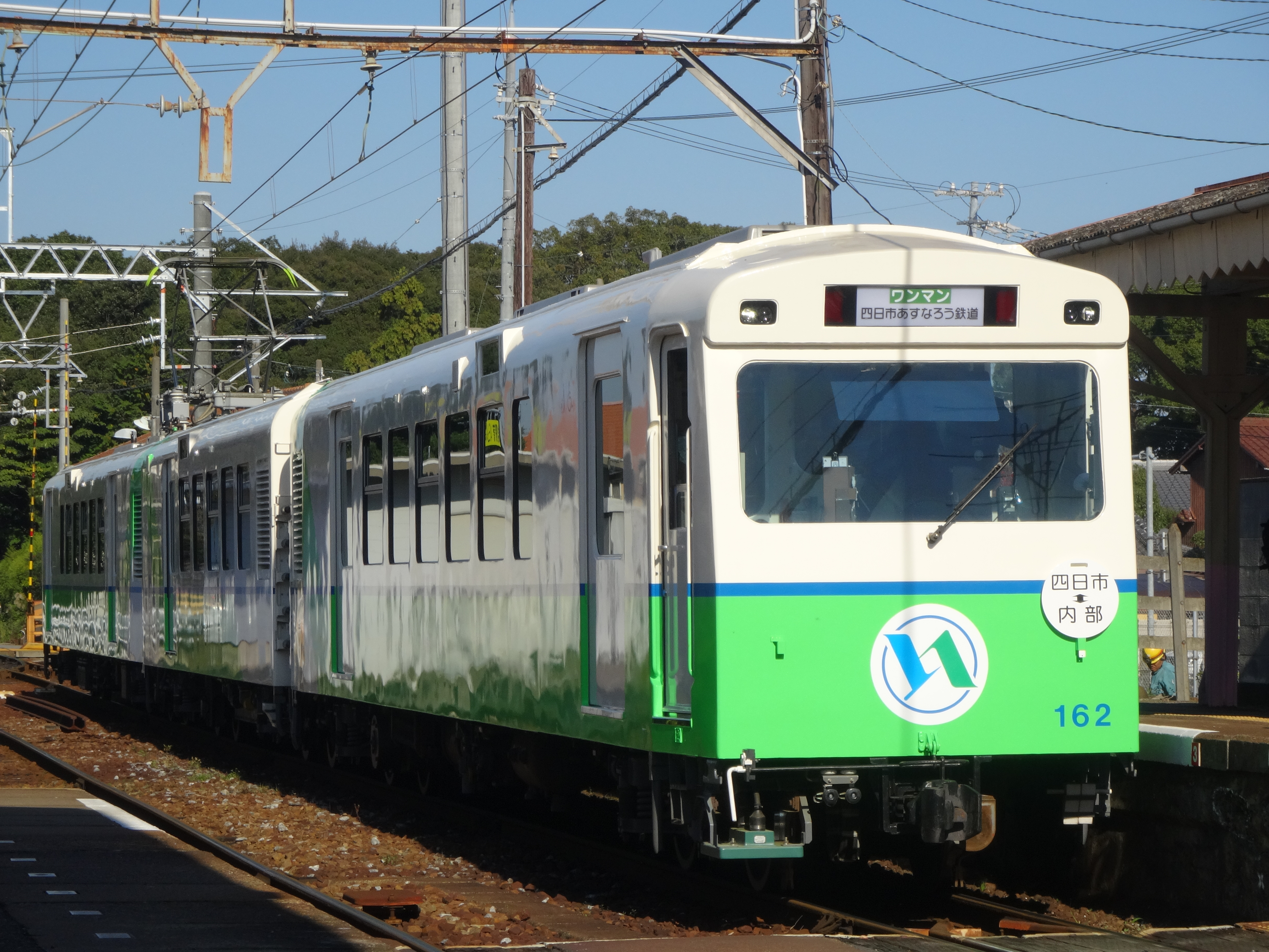 四日市あすなろう鉄道の新260系の第２編成日永駅にて